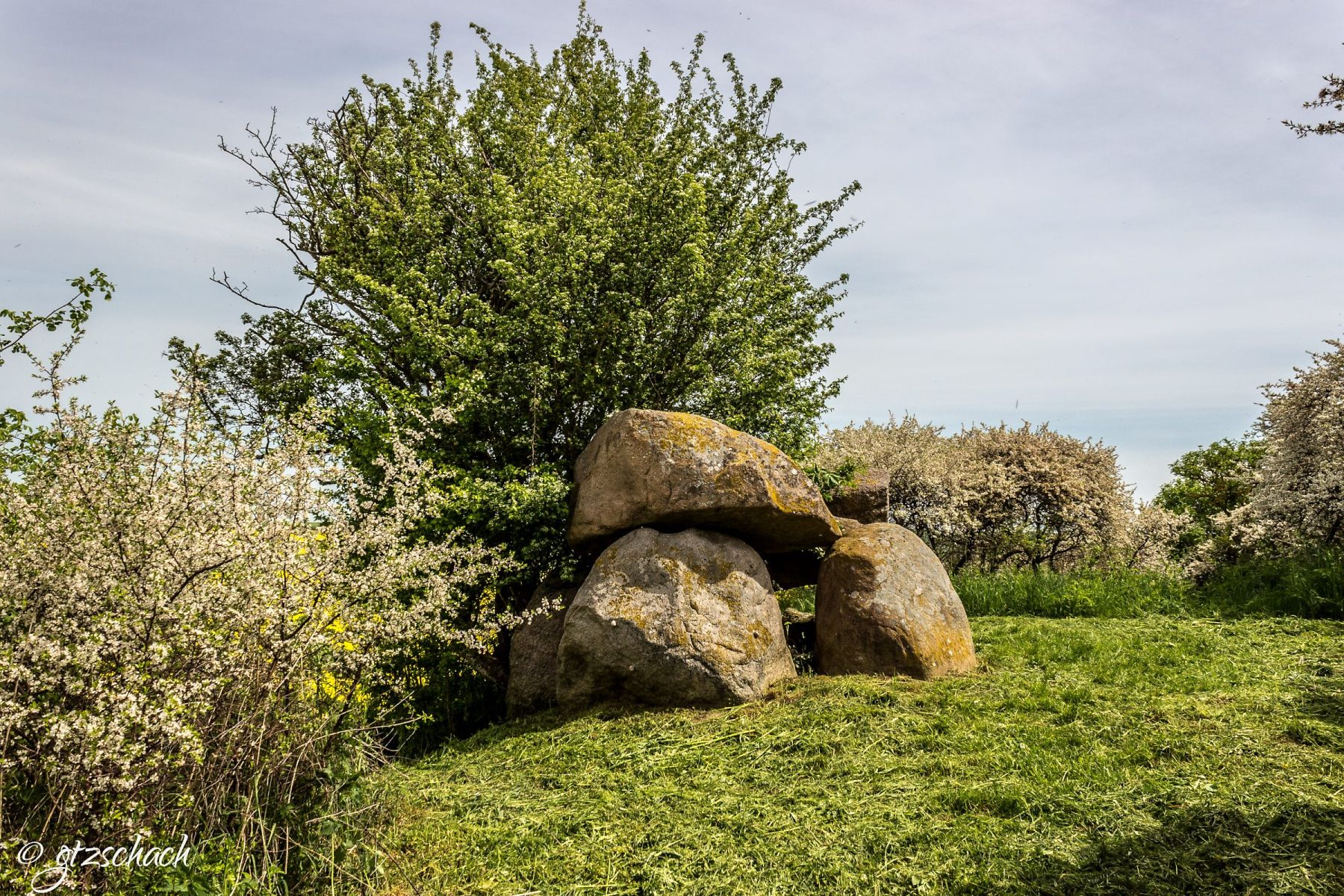 Ein typisches, klassisches Dolmengrab in Mürow/Uckermark Es handelt sich um ein Großsteingrab in Form eines erweiterten Dolmen aus Granitfindlingen in Nordwest-Südost – Ausrichtung. Die Trägersteine haben eine Höhe von ca. 1,65 Meter. Nach Südosten hin ist die Anlage nur mit einem halb hohen Stein verschlossen, so dass ein Einstieg in den Dolmen jederzeit möglich ist. Die Innenkammer misst etwa 2,45 Meter in der Länge und ca. 0,95 bis 1,35 Meter in der Breite.